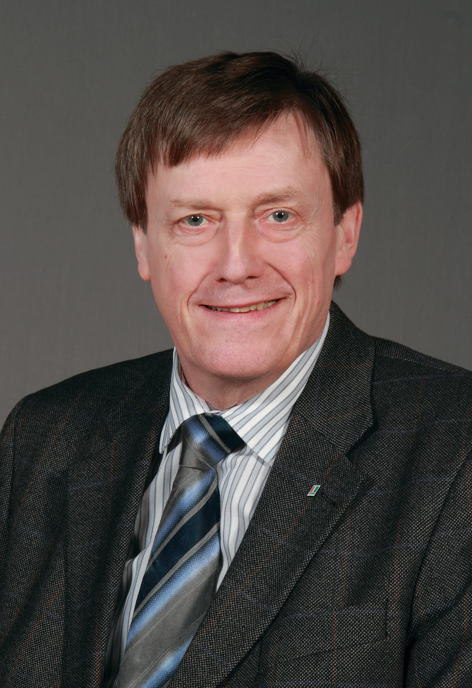 LandtagsabgeordneteR NRW